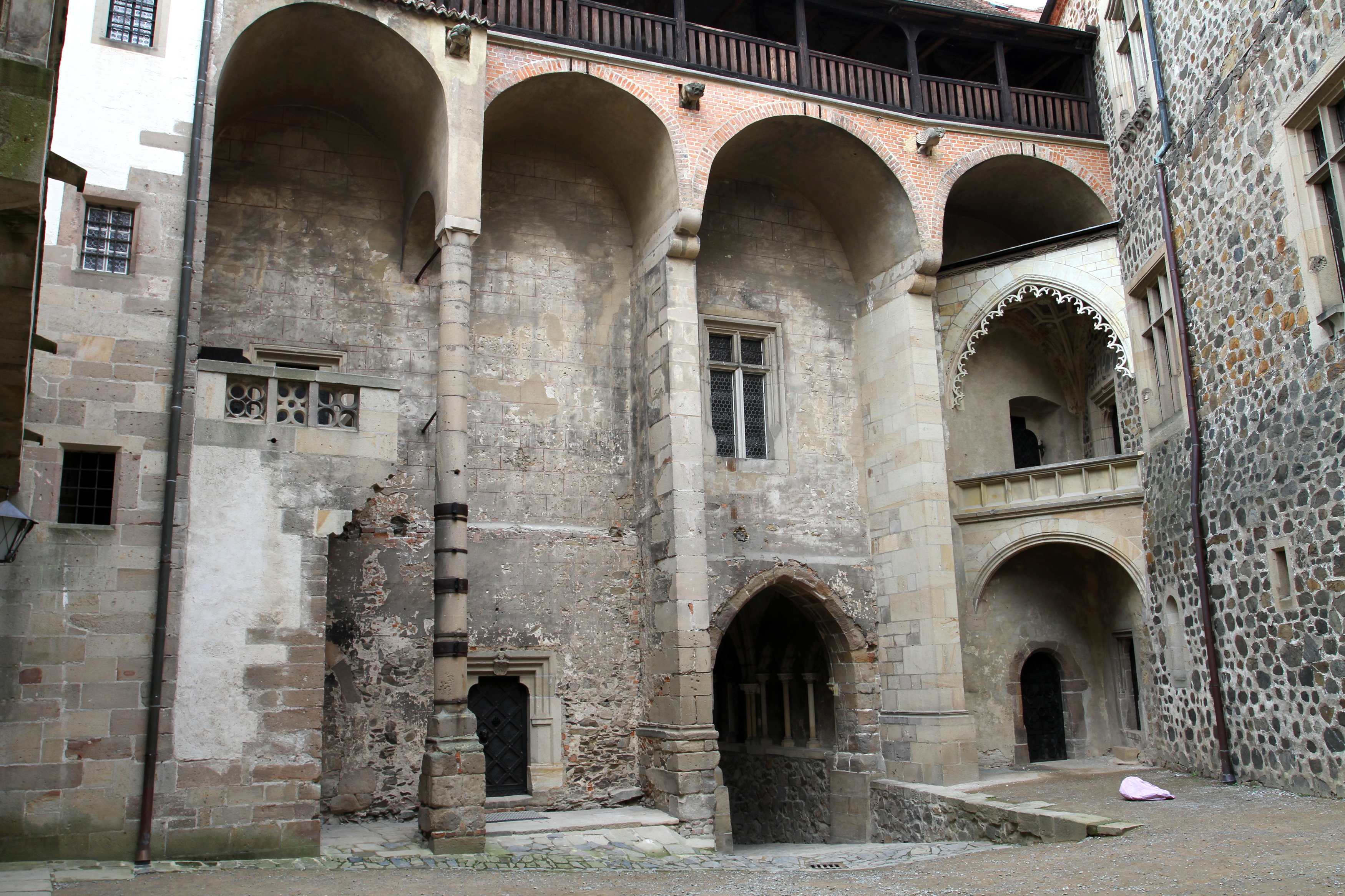 Hrad Křivoklát (Křivoklát), Křivoklát 47